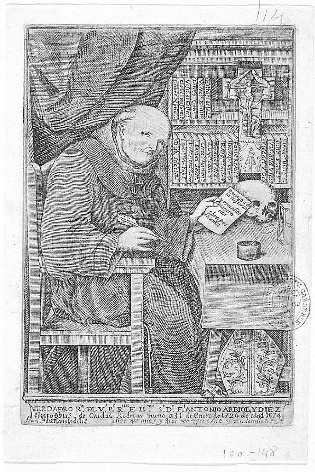 Retrato de Antonio Arbiol, grabado calcográfico. Inscripción: "VERDADERO Rto. DEL Ve. Pe. Rmo. E Ilmo. Sr. Dn. Fl. ANTONIO ARBIOL, Y DIEZ / electo Obis.º de Ciudad -Rodrigo murió a 31 de enero de 1726 de edad de 74 años 4 mes. y días". Firmado por Francisco del Plano y "Zudanello" como grabador, en Zaragoza.